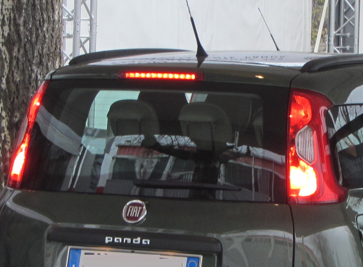 segnale di stop in una Panda 4x4